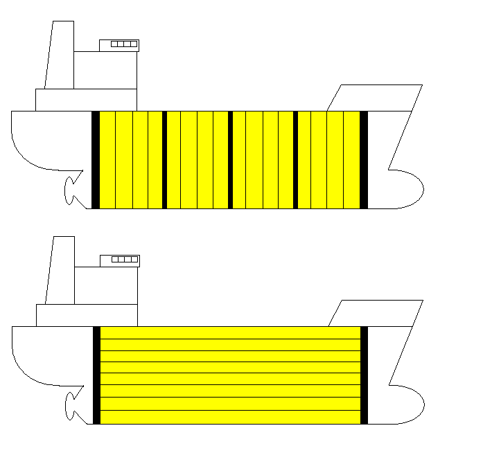 Vereinfachter Vergleich Querspantensystem zum Isherwood System